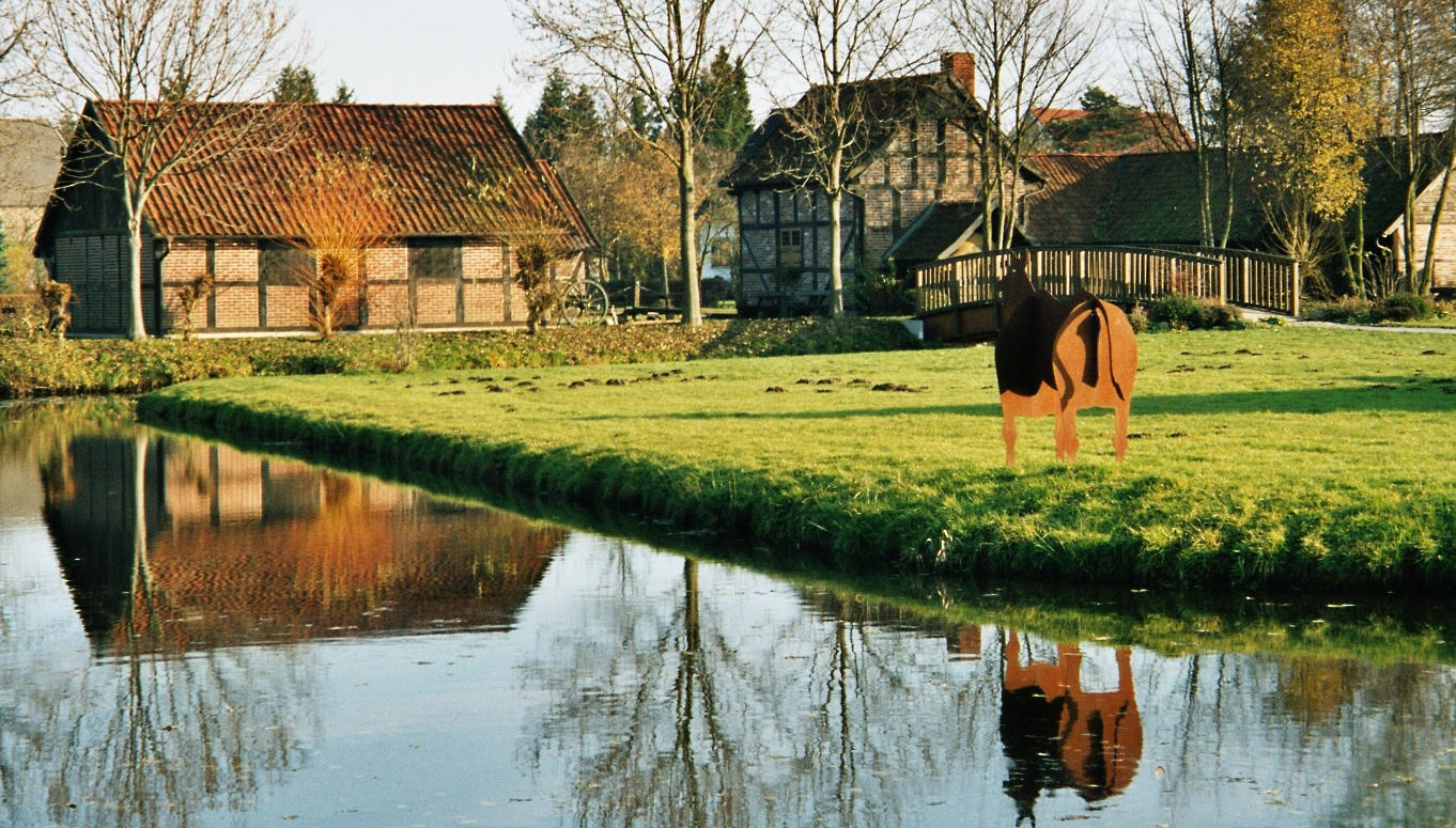 Mühlenensemble Venne